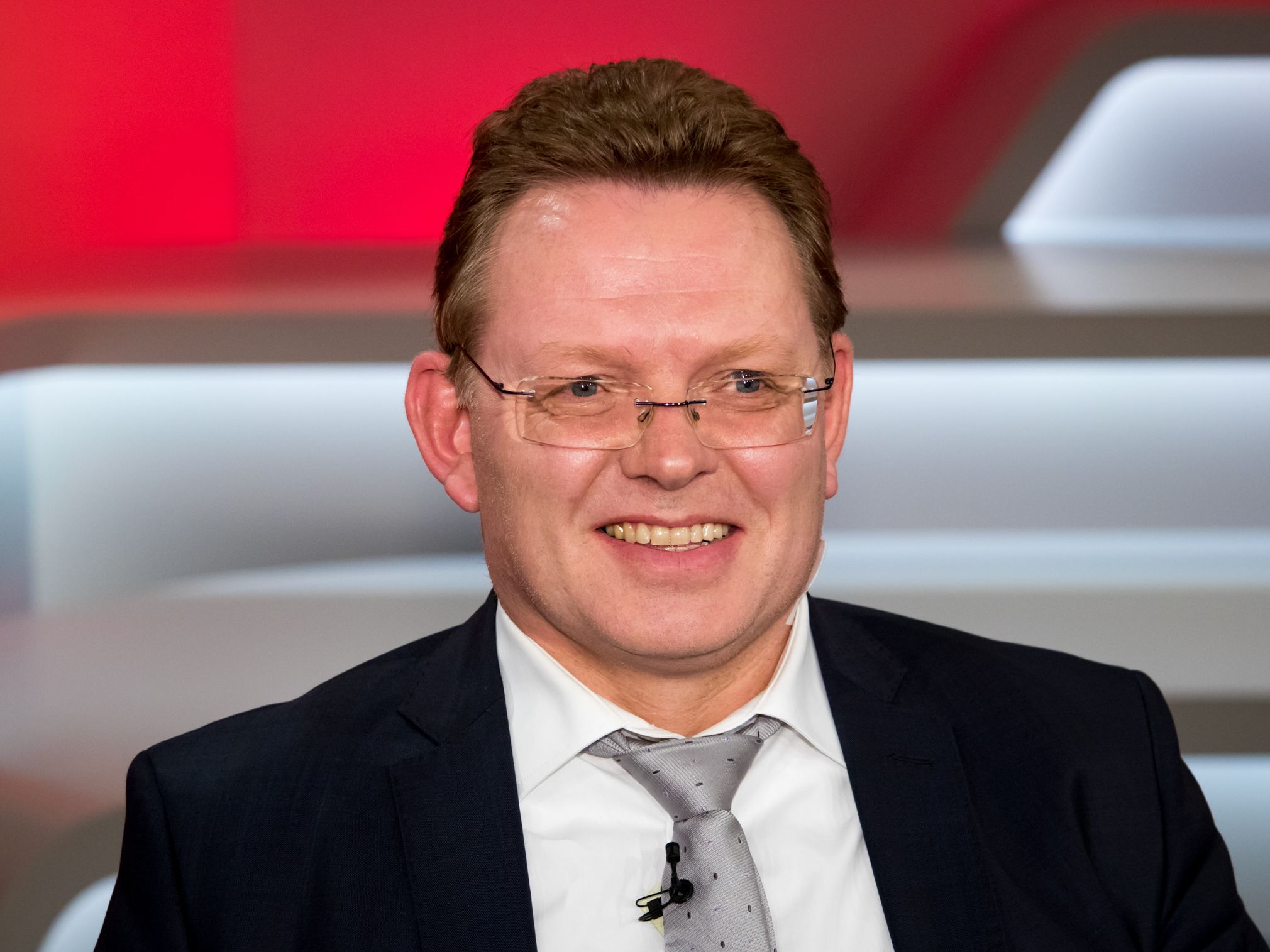 Andreas Hollstein in der WDR-Sendung "Maischberger" am 21.11.2017